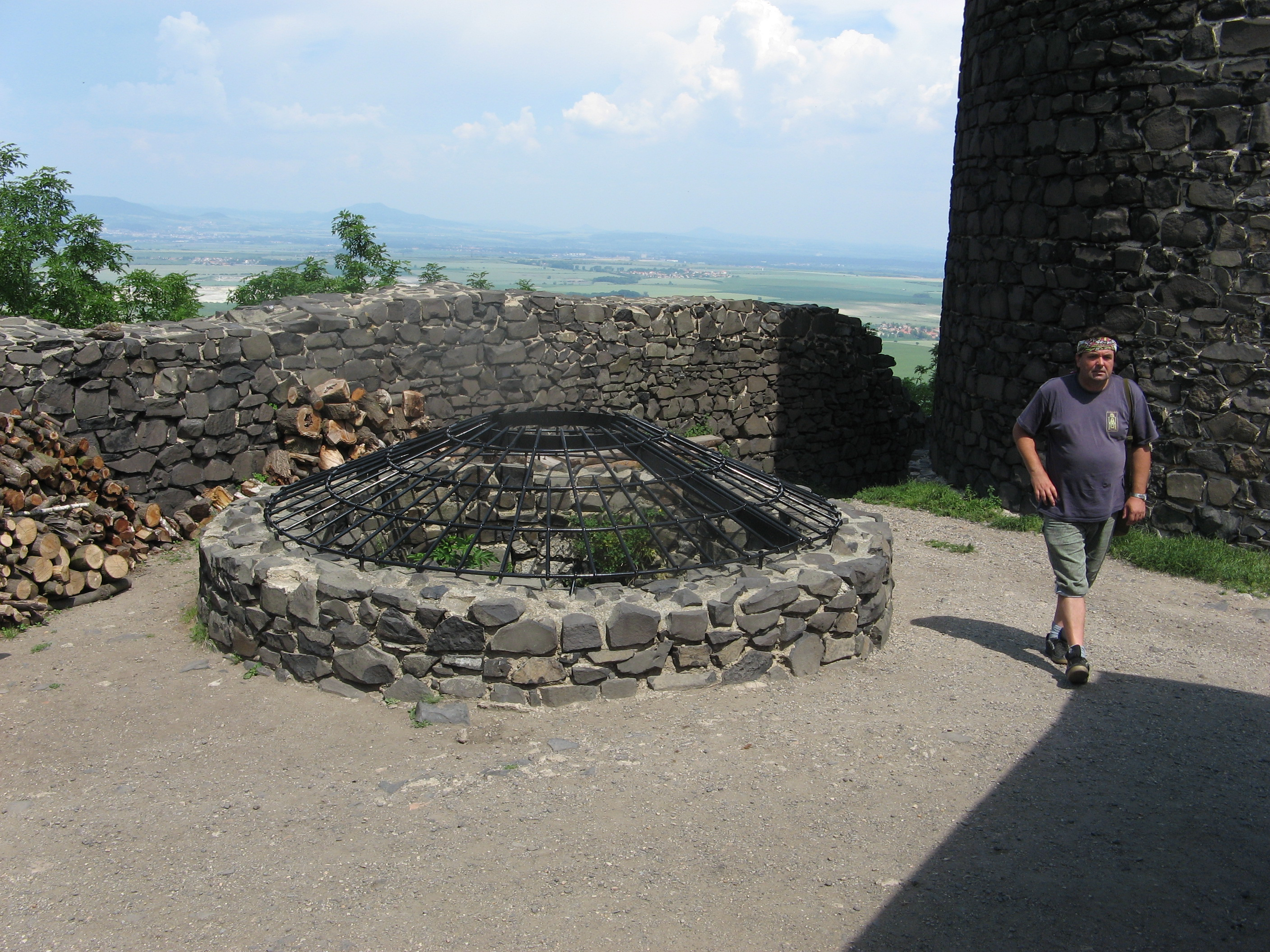 Hazmburk, vodní cisterna